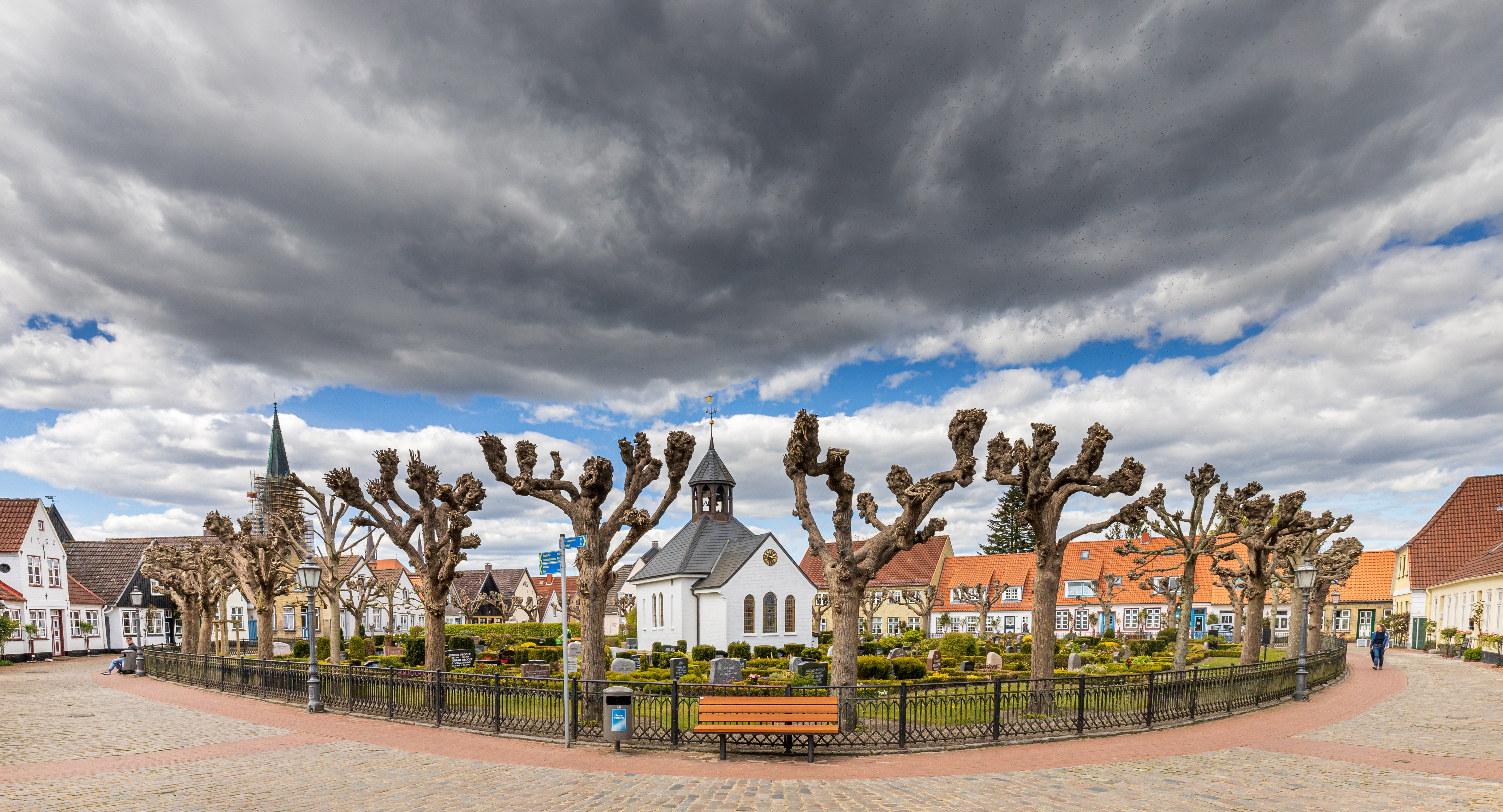 Friedhof der Holmer Beliebbung